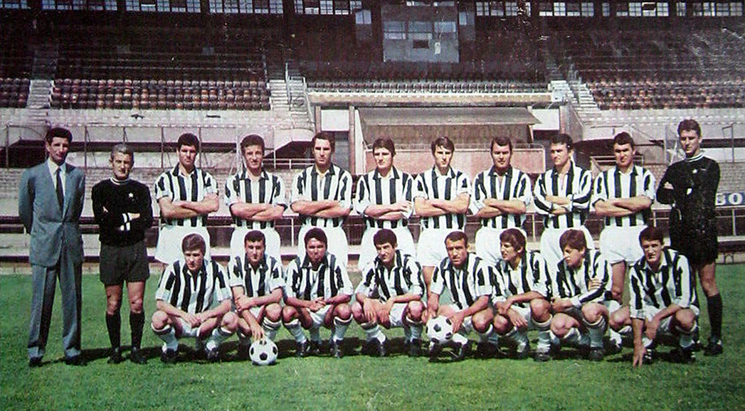 La rosa della Juventus campione d'Italia nella stagione 1966-67 in posa all'interno dello stadio Comunale di Torino.